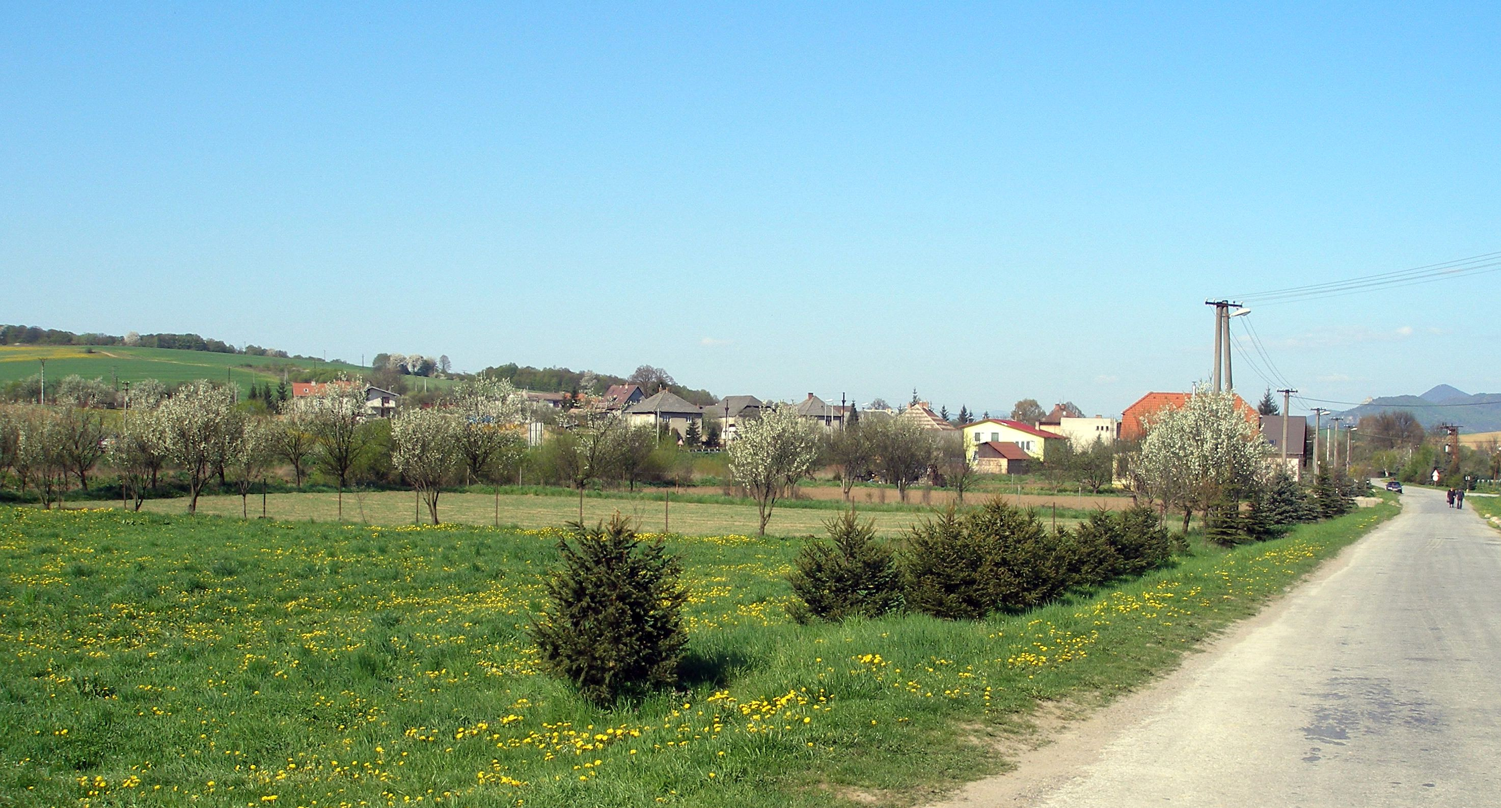 Obec Lipníky okres Prešov región Šariš